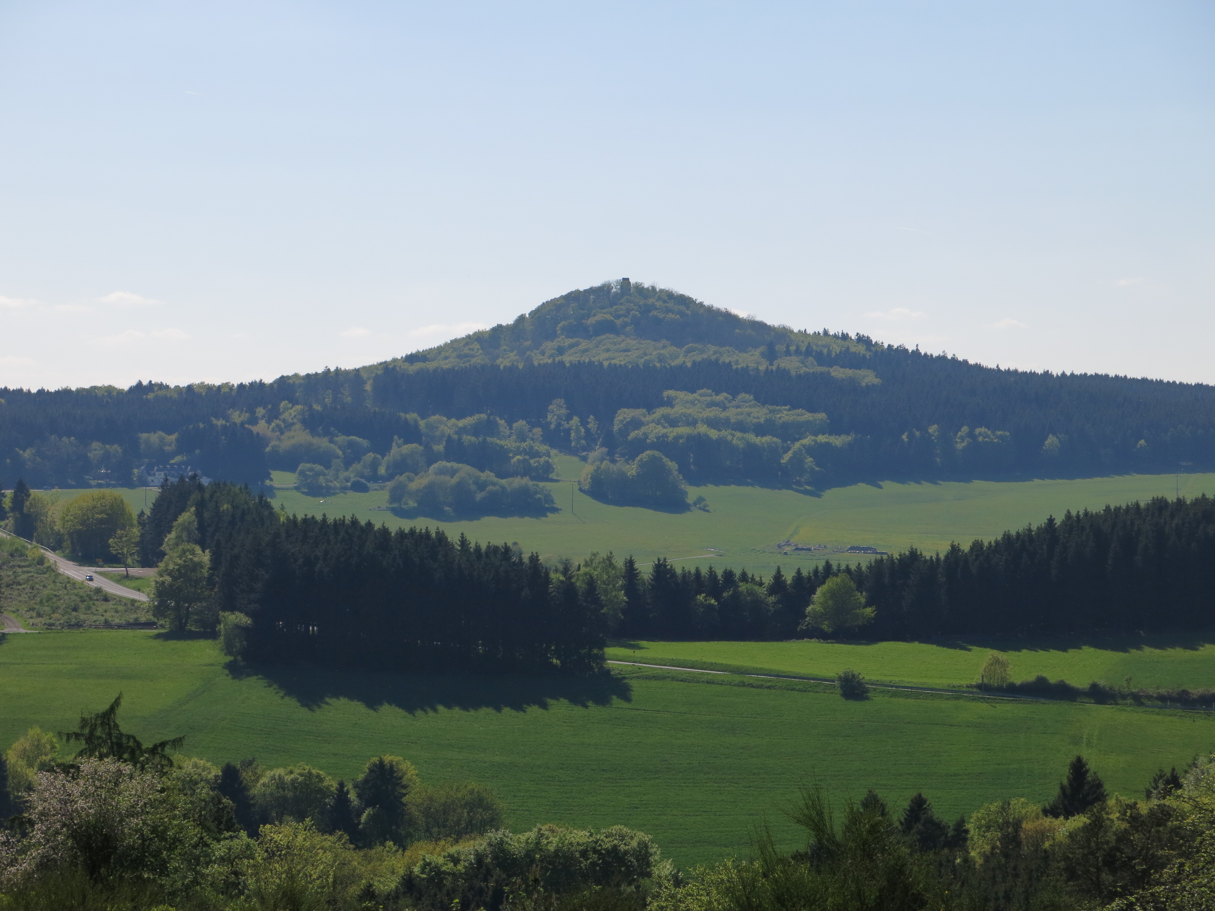 Hohe Acht in der Eifel von Osten